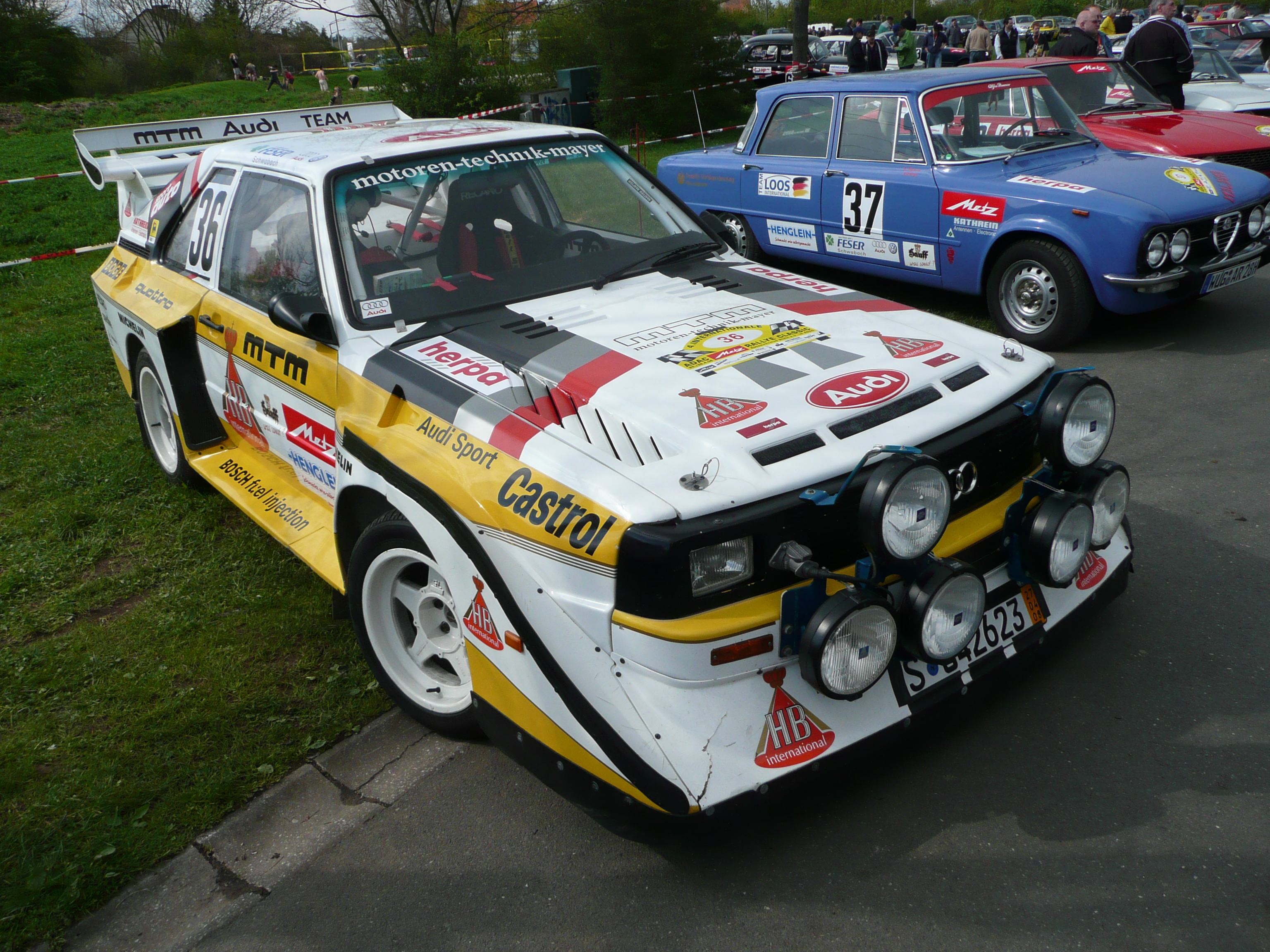 Audi Sport Quattro E2 bei der Metz Rallye 2008